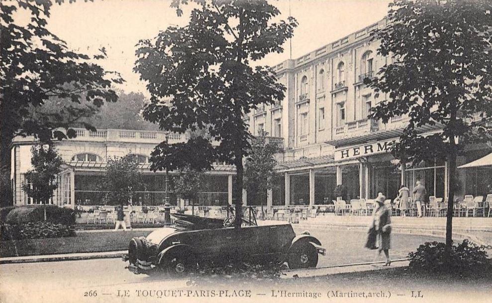 Le Touquet-Paris-Plage - CP - L'Hermitage (Martinet, architecte)